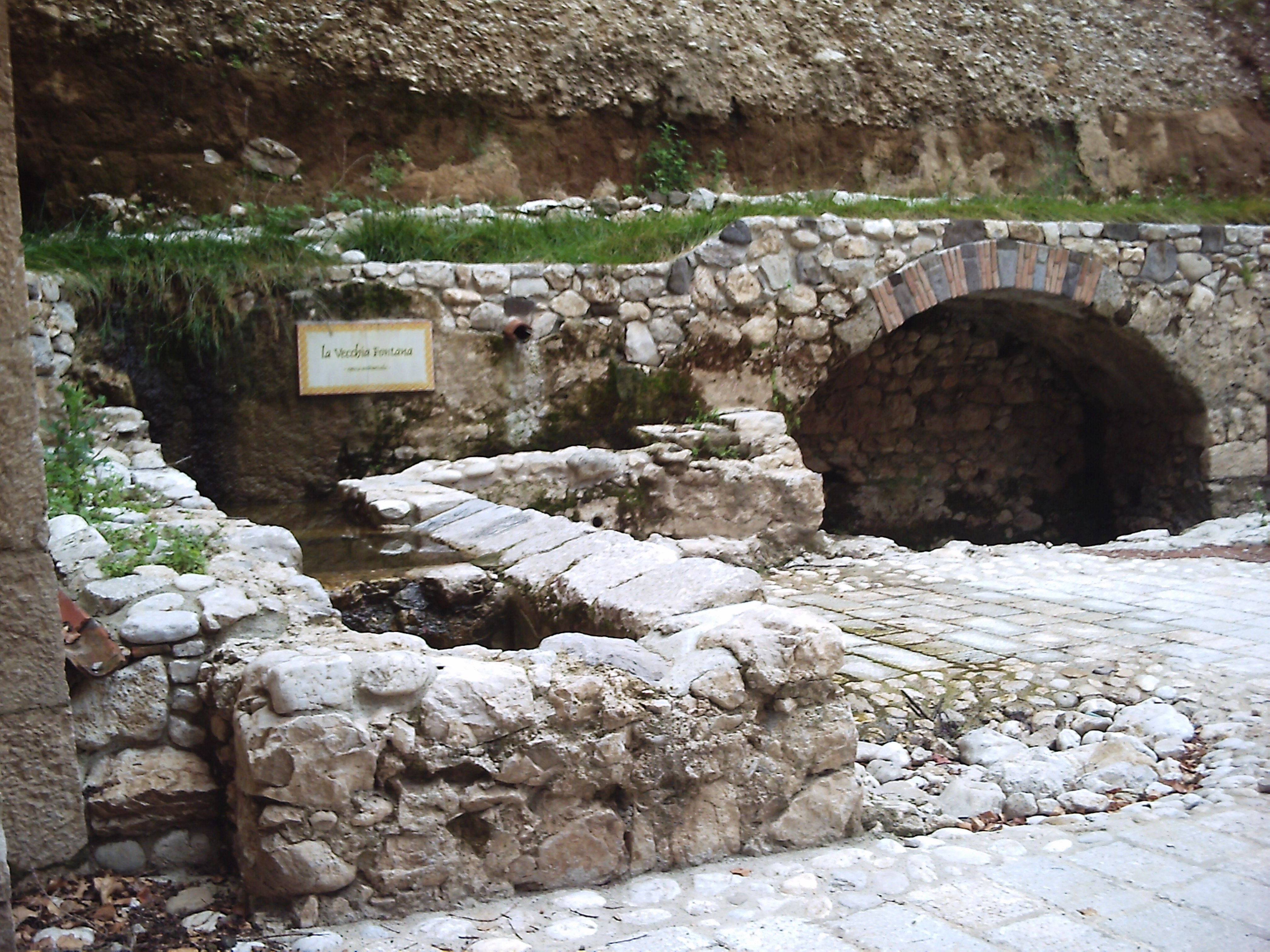 vasche e fontana realizzate presso un varco dell'acquedotto ipogeo di Faicchio (Bn)